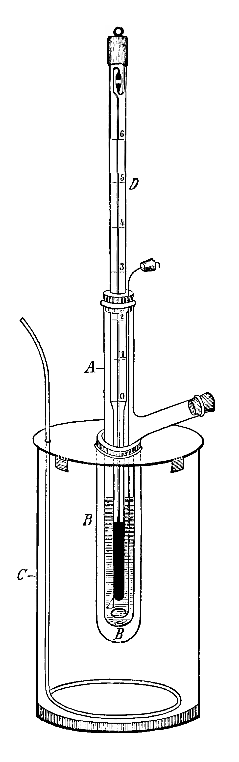 Аппарат Бекмана для криоскопического определения молекулярных масс